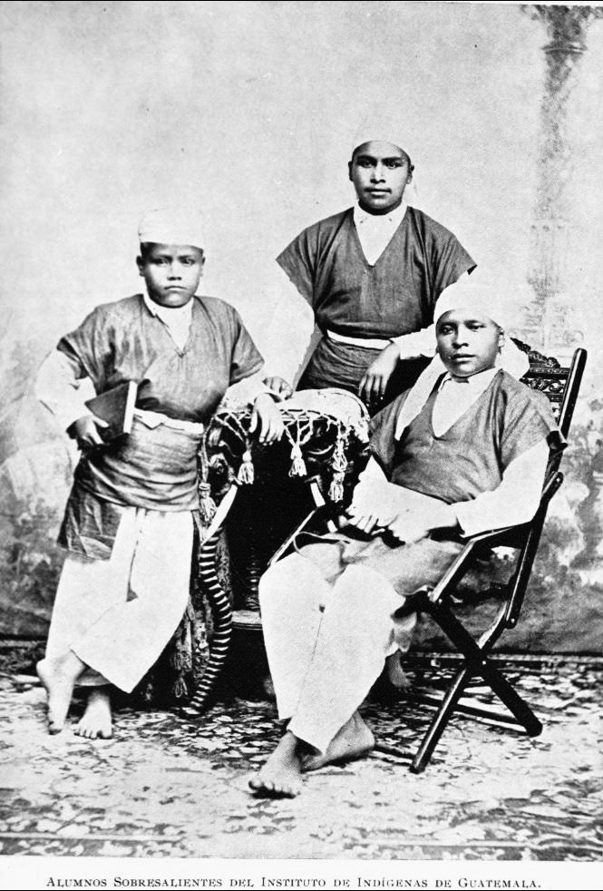 Alumnos distinguidos del Instituto Agricola de Indígenas. Guatemala, 1897.